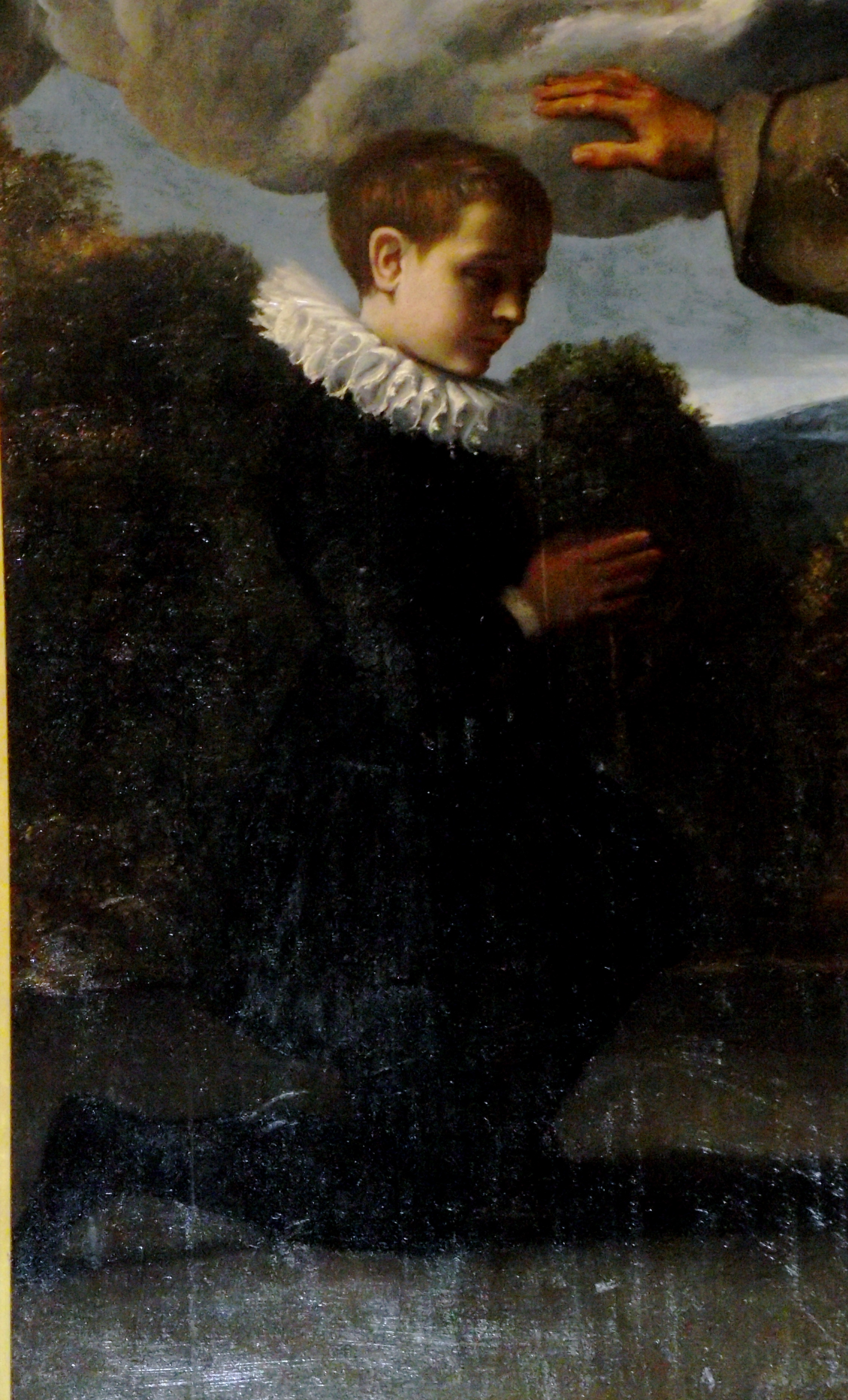 San Diego di Alcalà presenta il figlio di Juan de Herrera a Gesù. Dettaglio: ritratto di Diego de Herrera